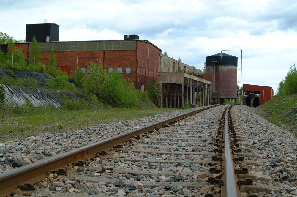 Kulsinterverket i Persberg. Foto:Cucumber 2004.